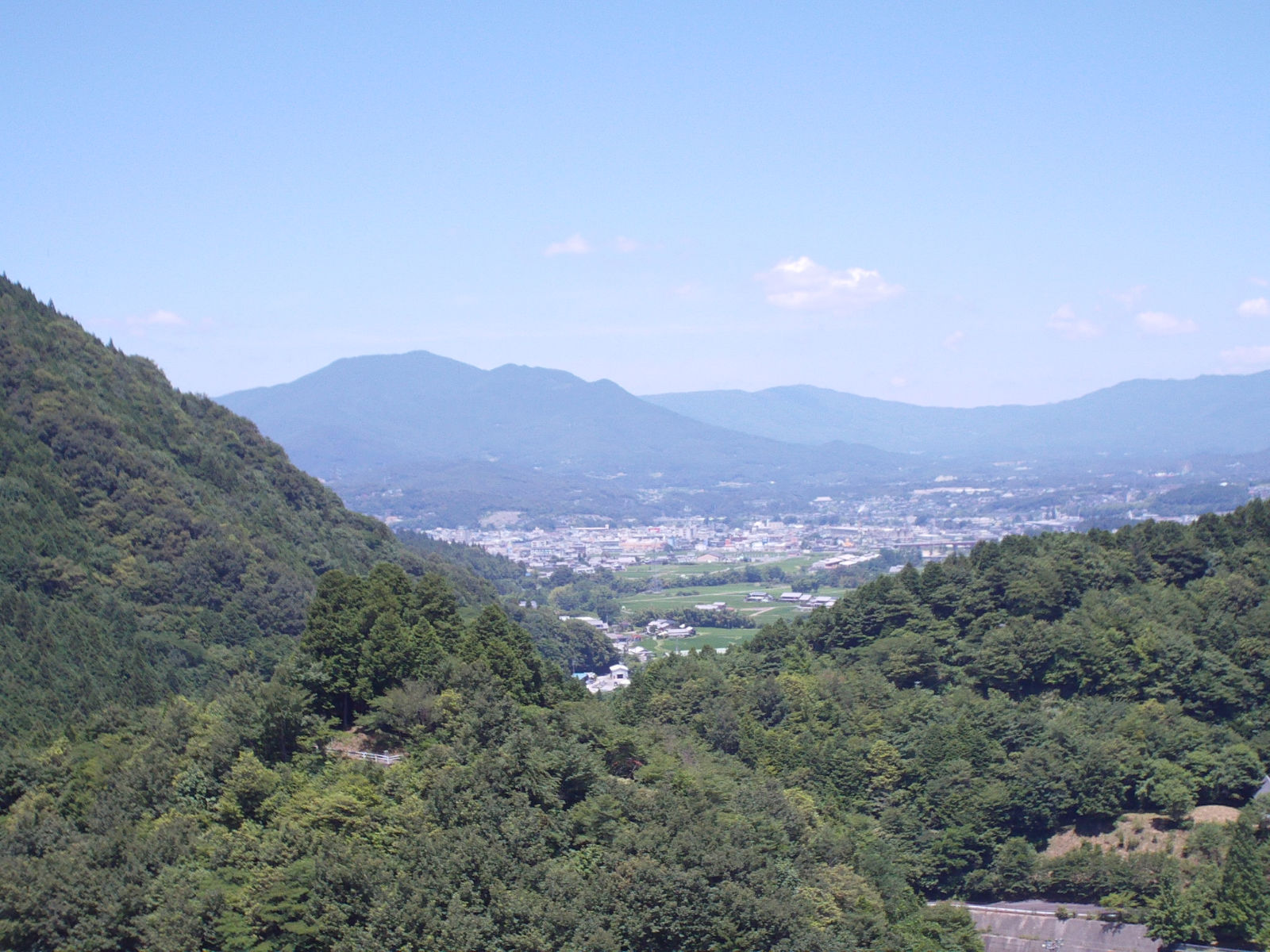 恵那市眺望